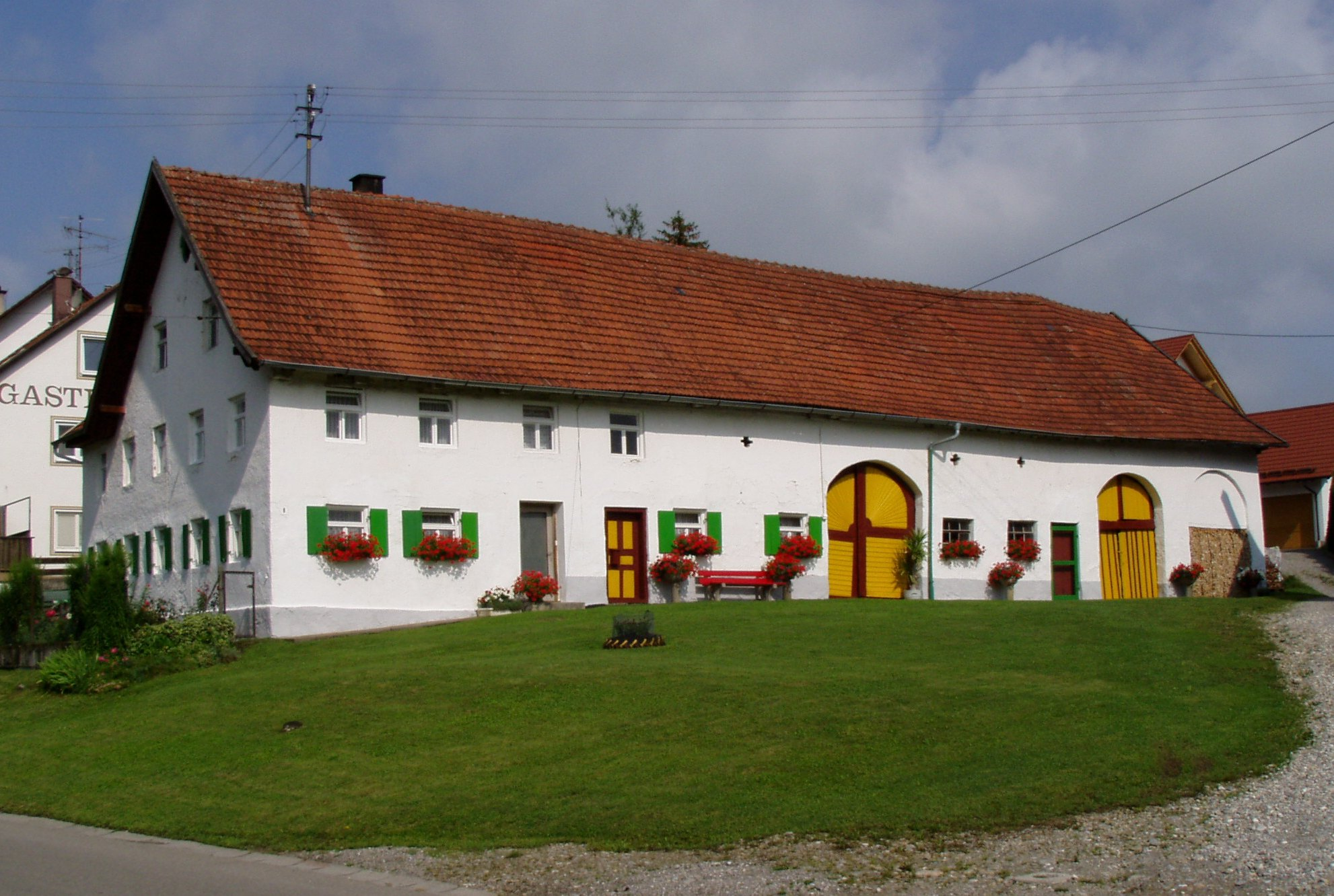 Bauernhof Sontheimer Str. in Stetten (Unterallgäu)